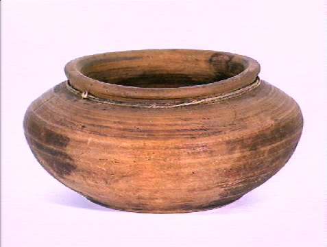 Gjetslebolle fra Ringerike i Buskerud. Bollen er laget av bjørk, diameter 18 cm. Norsk Folkemuseum. NF.1926-0551. Foto Anne-Lise Reinsfelt.